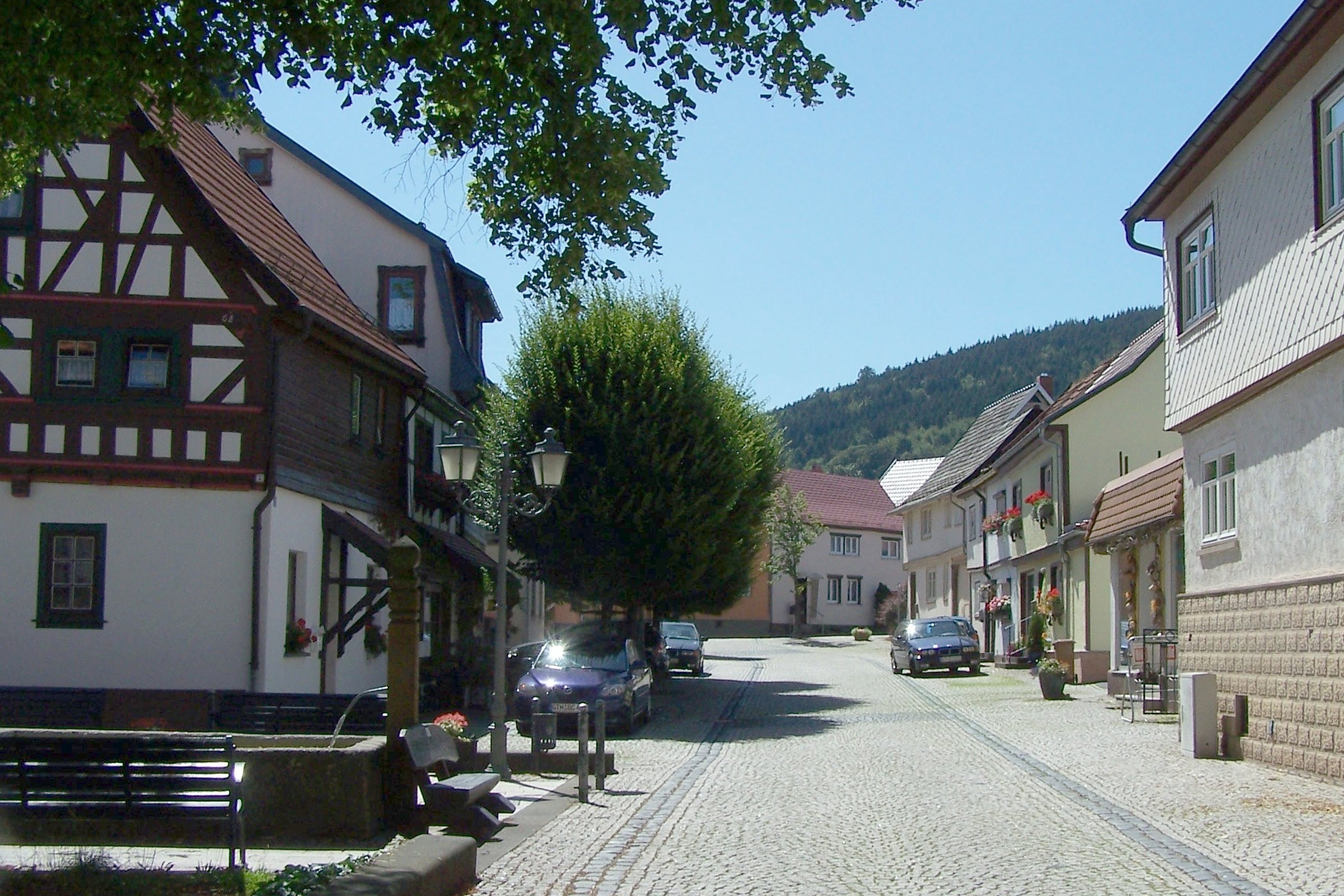 In der Lindenstraße - die Ortsmitte von Cabarz, links ein 1824 als Schwemme aufgebauter Laufbrunnen.